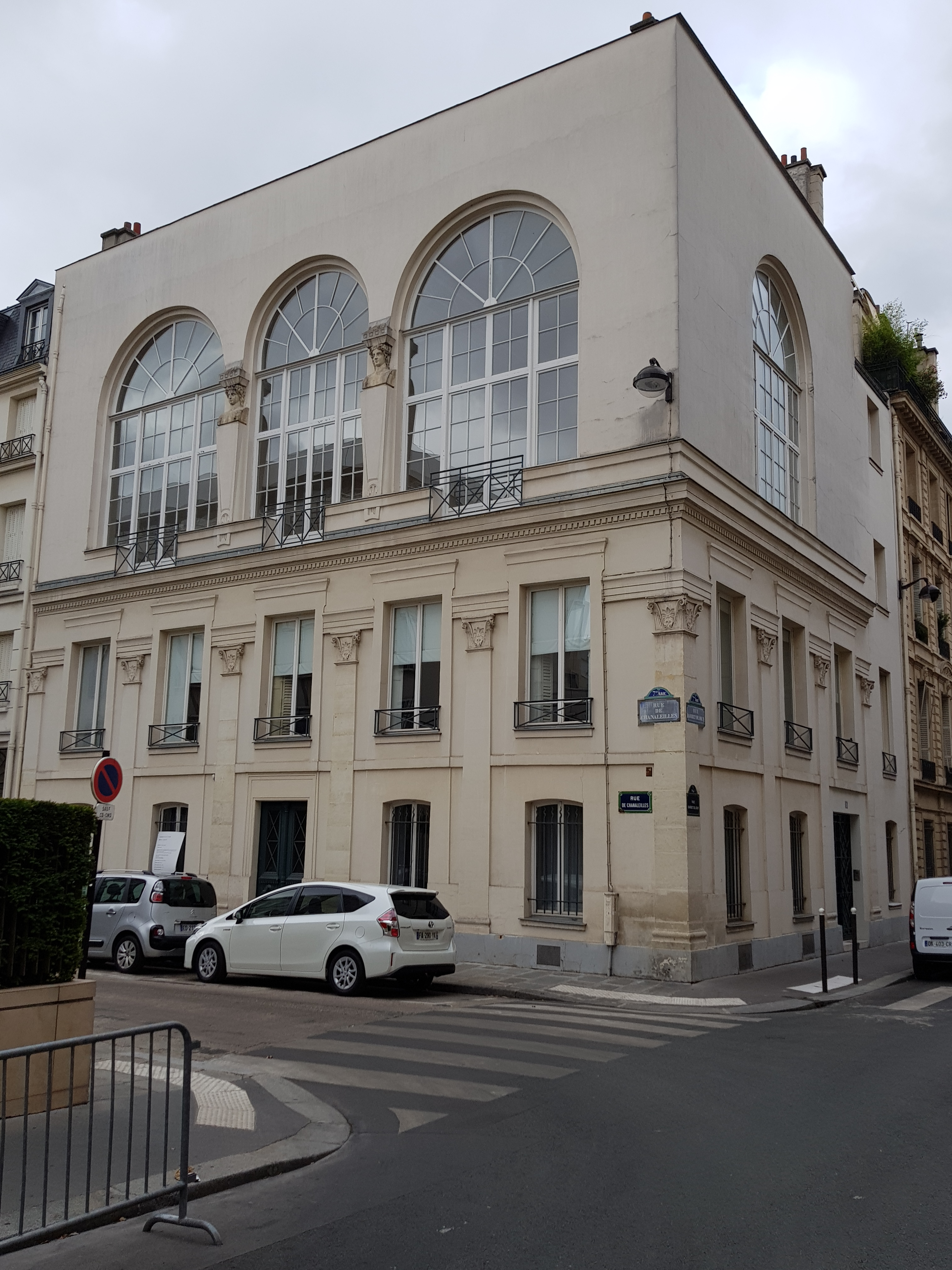 19, rue Barbet-de-Jouy, Paris 7e.